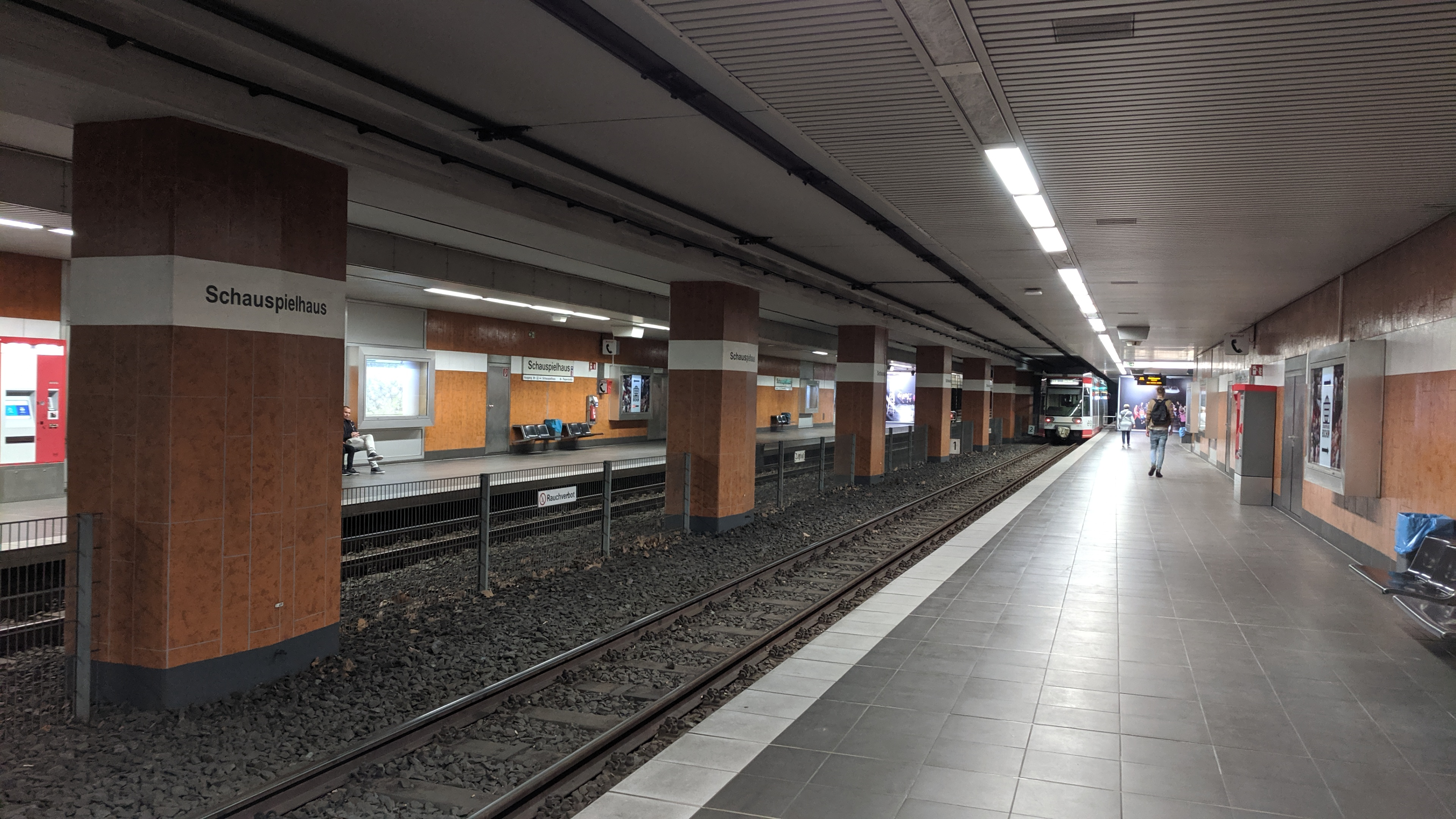 Stadtbahn Bochum, Haltestelle: Schauspielhaus, Linien 308, 318, Taken on 10 September 2019